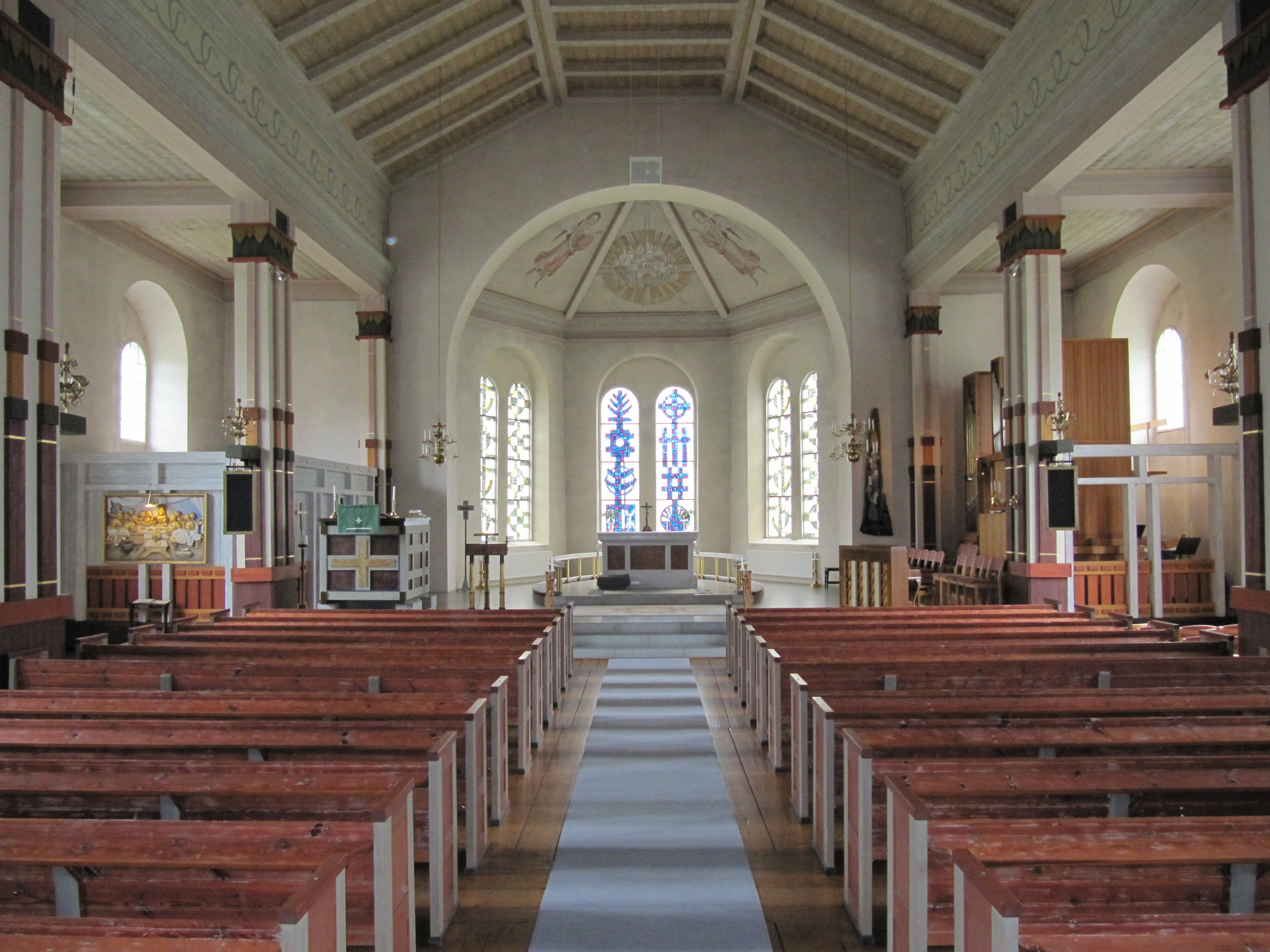 Kyrkorum i Vrigstads kyrka